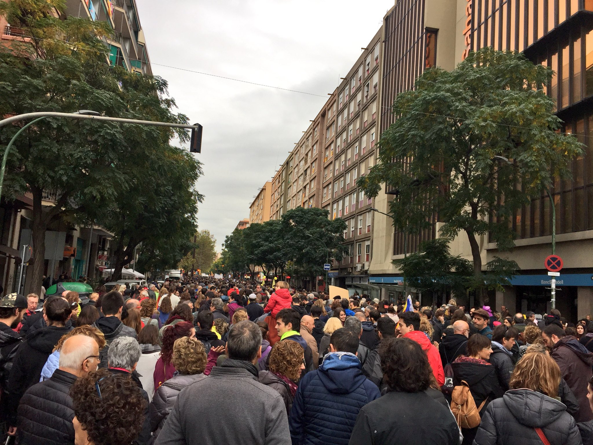 Vaga general de novembre de 2017 a Sabadell